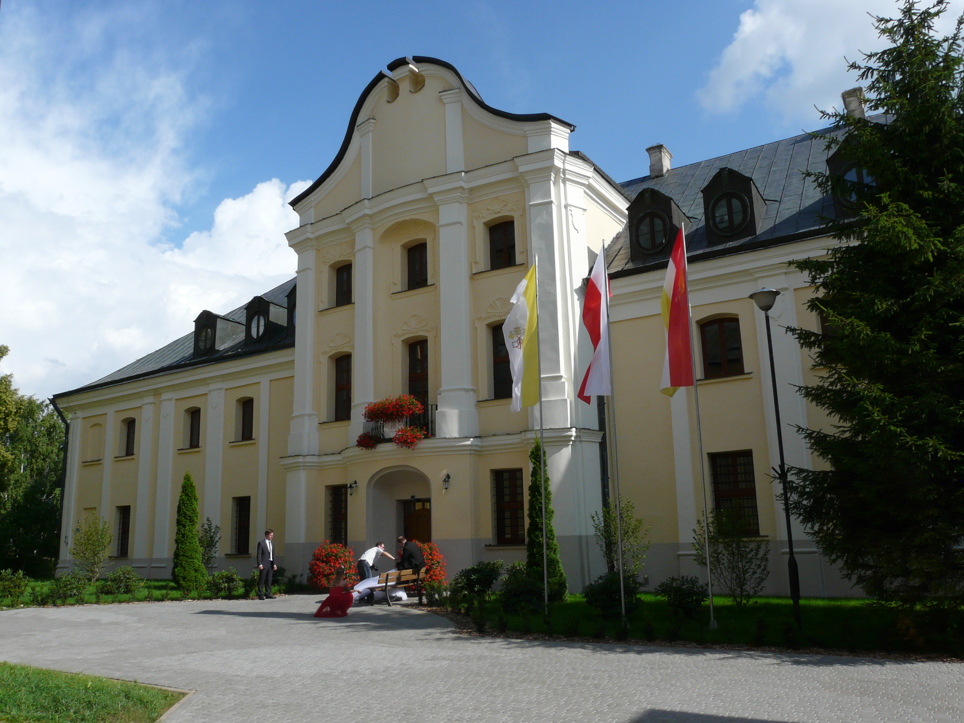 Wyższe Seminarium Duchowne w Drohiczynie